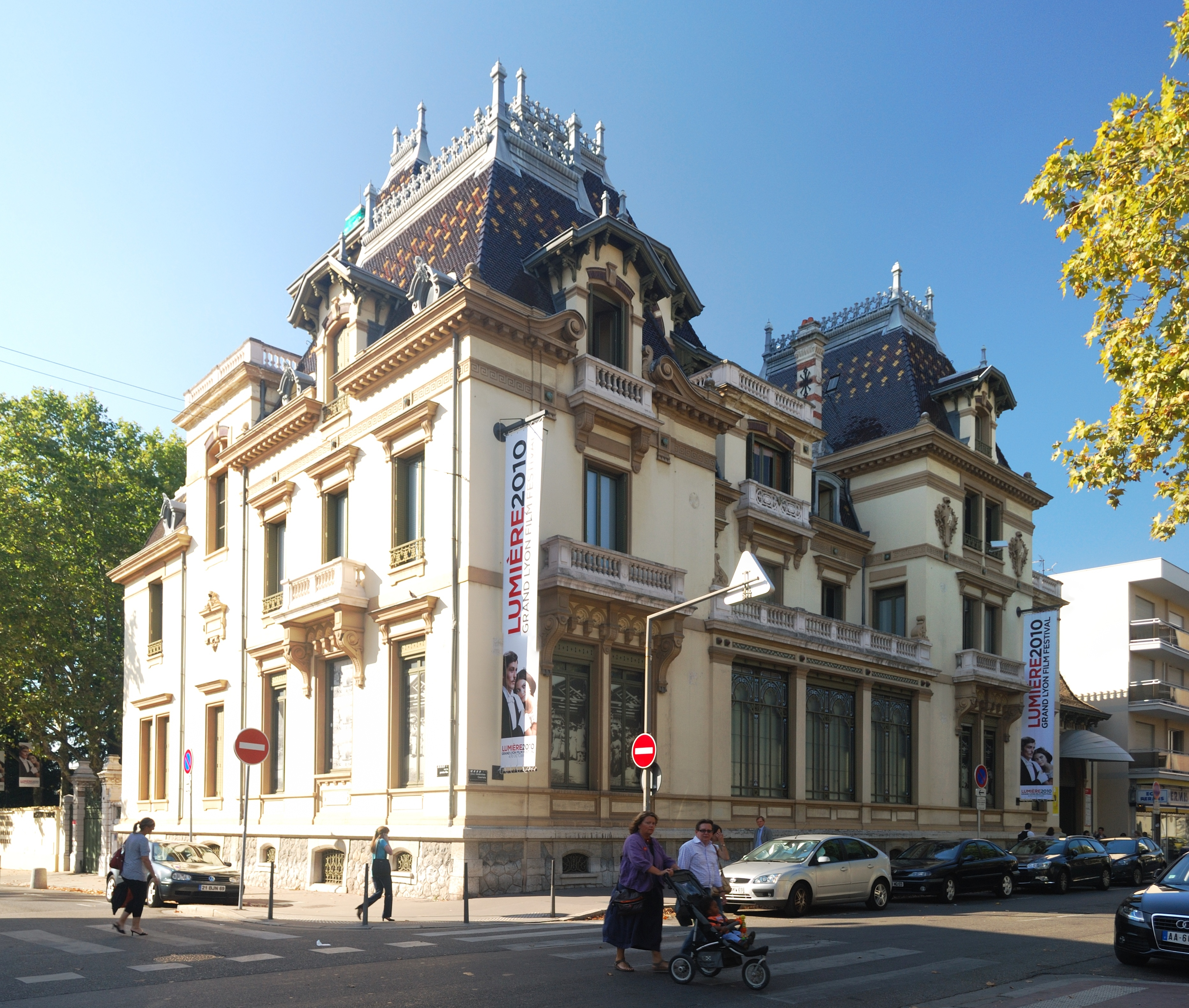 Lumière Museum (Institut Lumière), Lyon, France